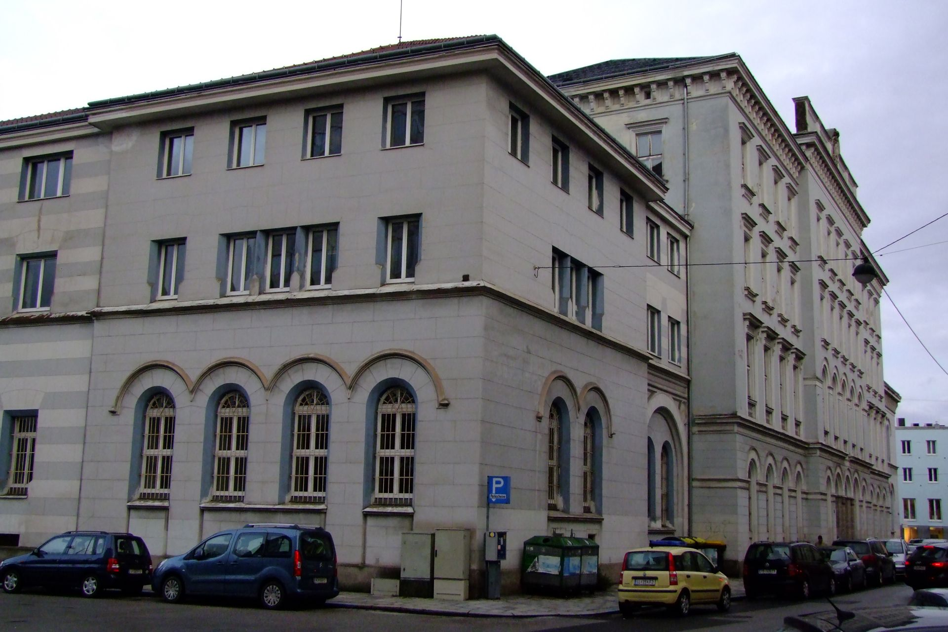 Finanzlandesdirektion, ehem. Hauptzollamt